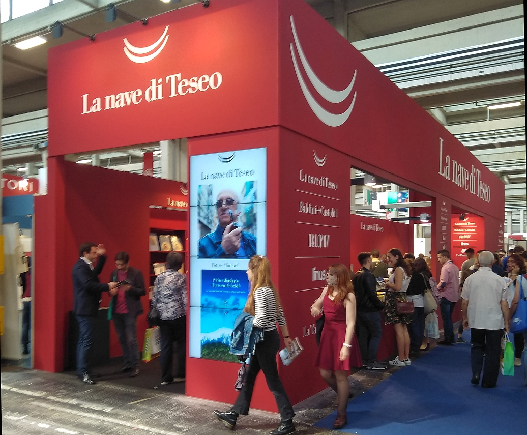 Salone del libro 2018 stand Nave di Teseo